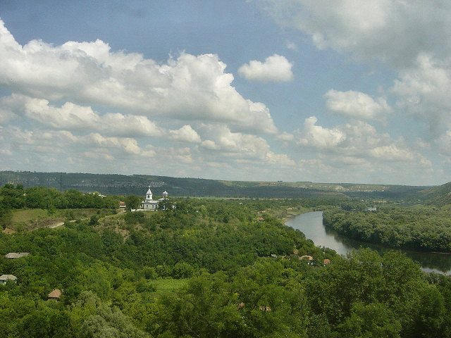 Der Dnister im Norden Moldawiens